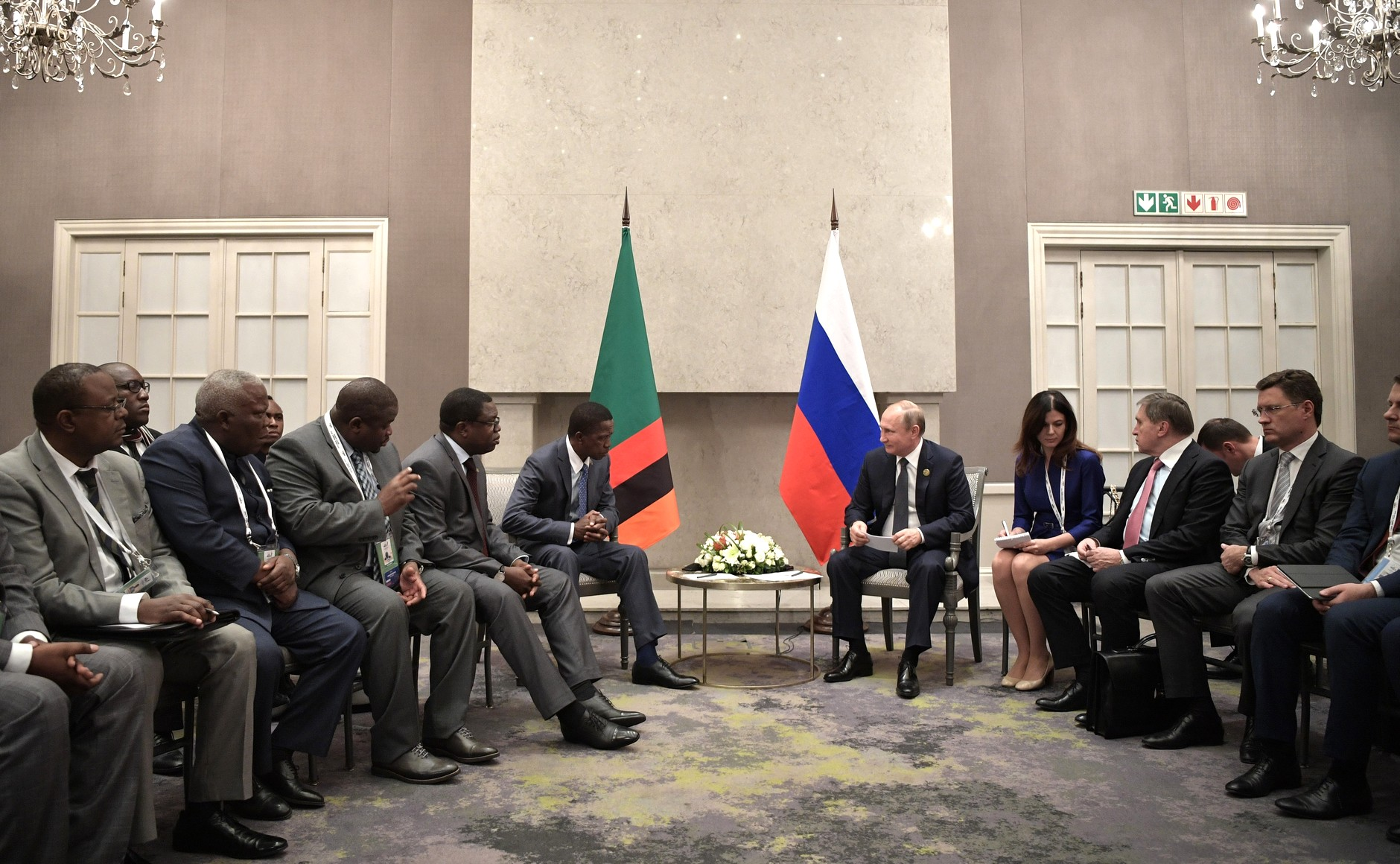 Встреча с Президентом Замбии Эдгаром Лунгу.